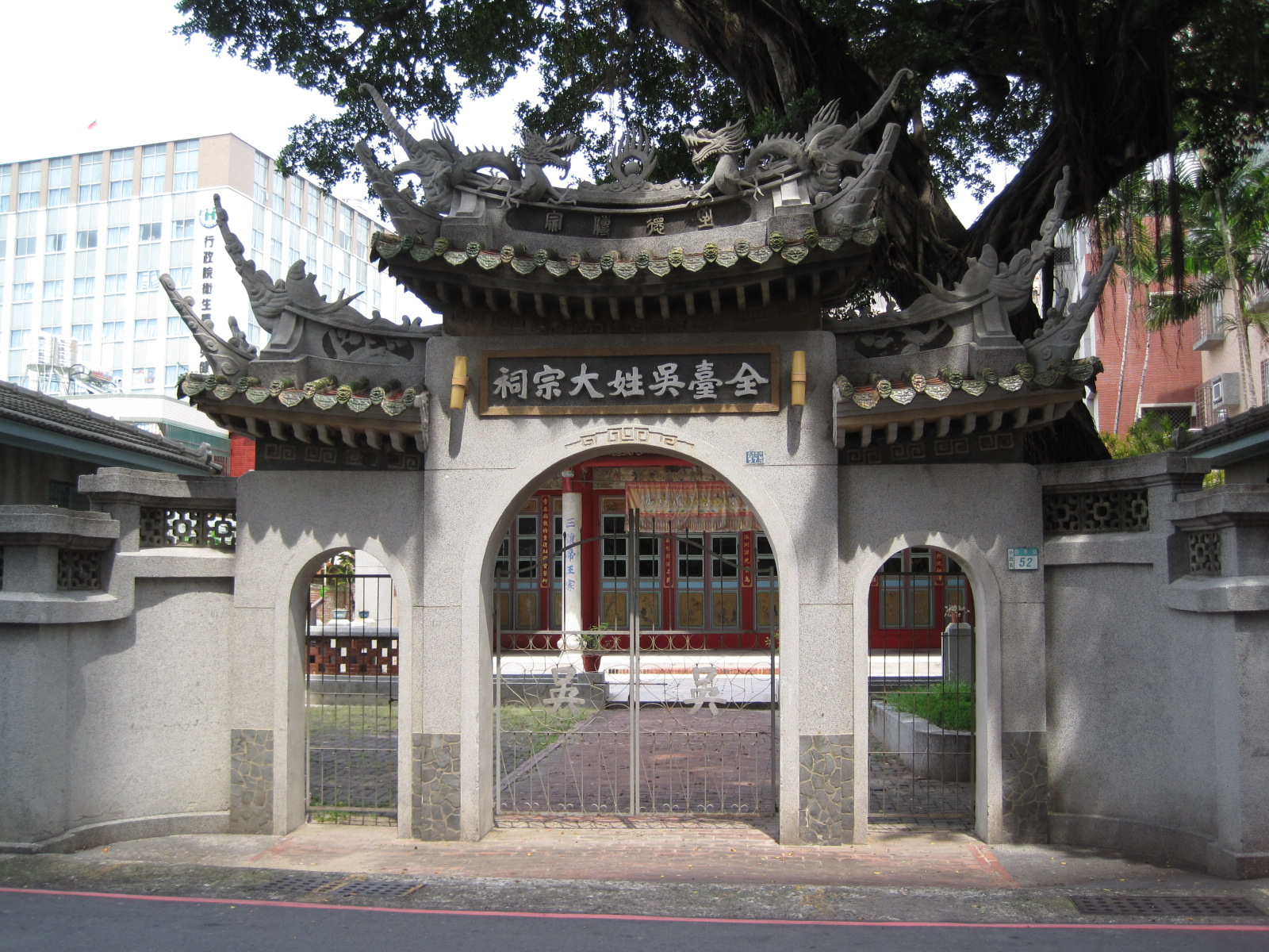 全臺吳氏大宗祠大門